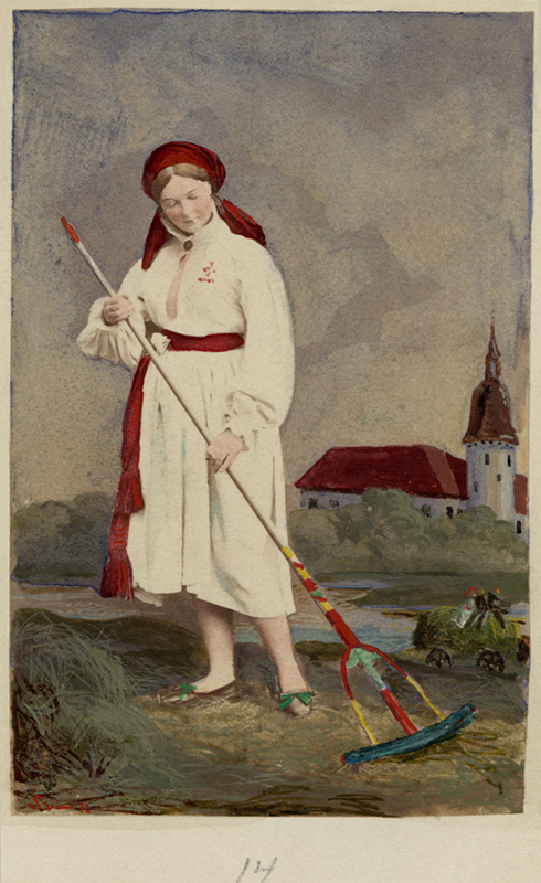 Höstflicka från Herrestad i Skåne. Dräktdocka med huvud skulpterat av C A Söderman, visad på världsutställningen i Paris 1867. Handkolorerad version med bakgrundsmiljö.